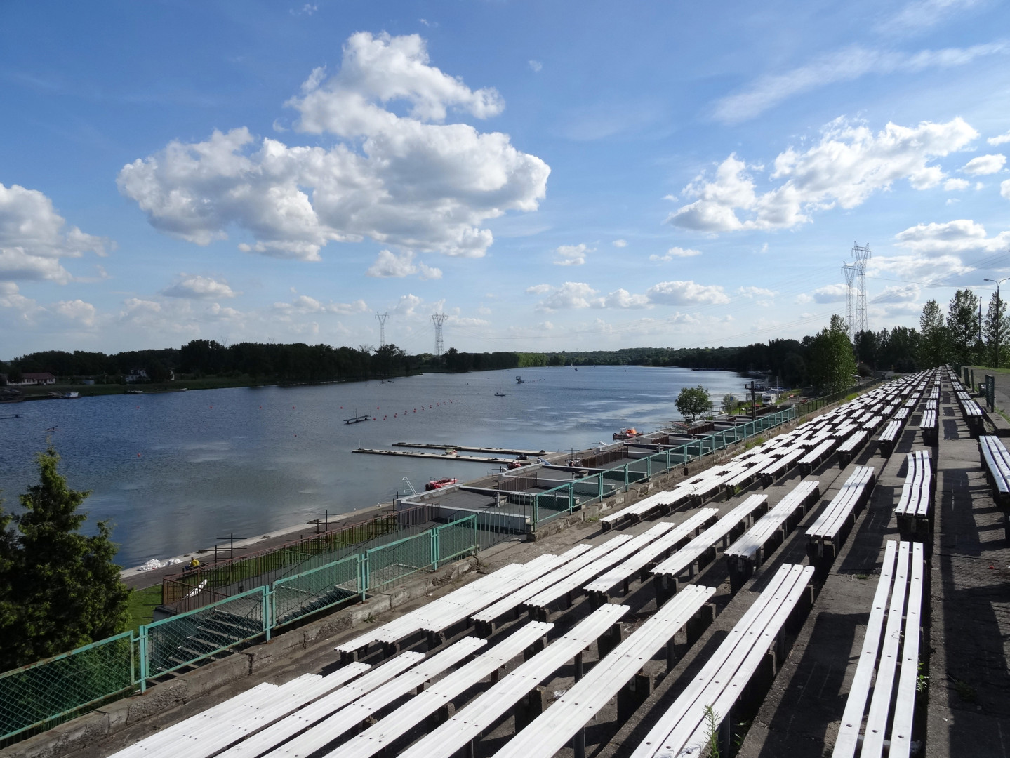 Tor regatowy w Bydgoszczy-Brdyujściu